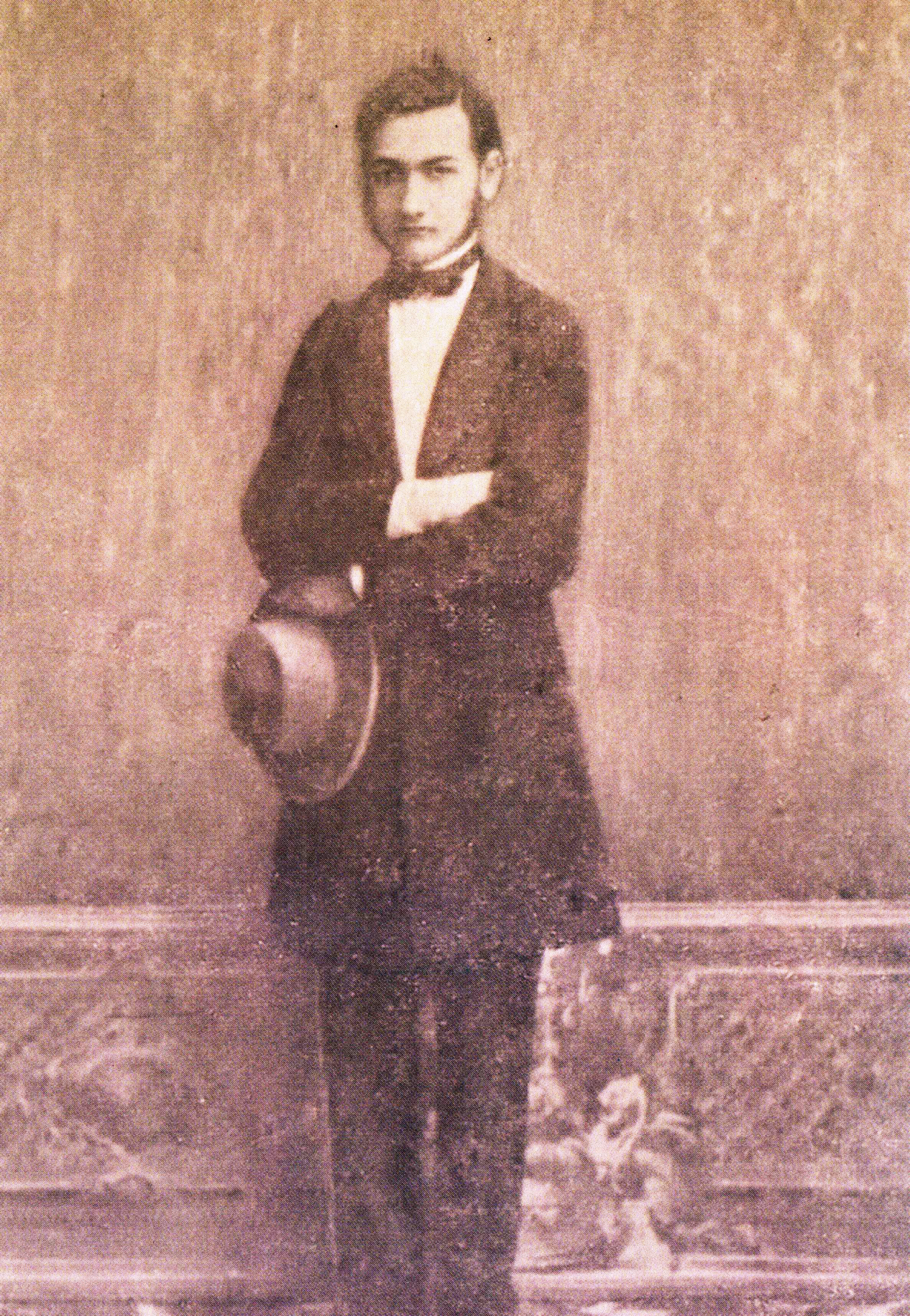 Фотограф Яков Петрович Данилевский. Фотография Ильи Ильича Мечникова, студента Харьковского университета. Харьков. 1860-е.